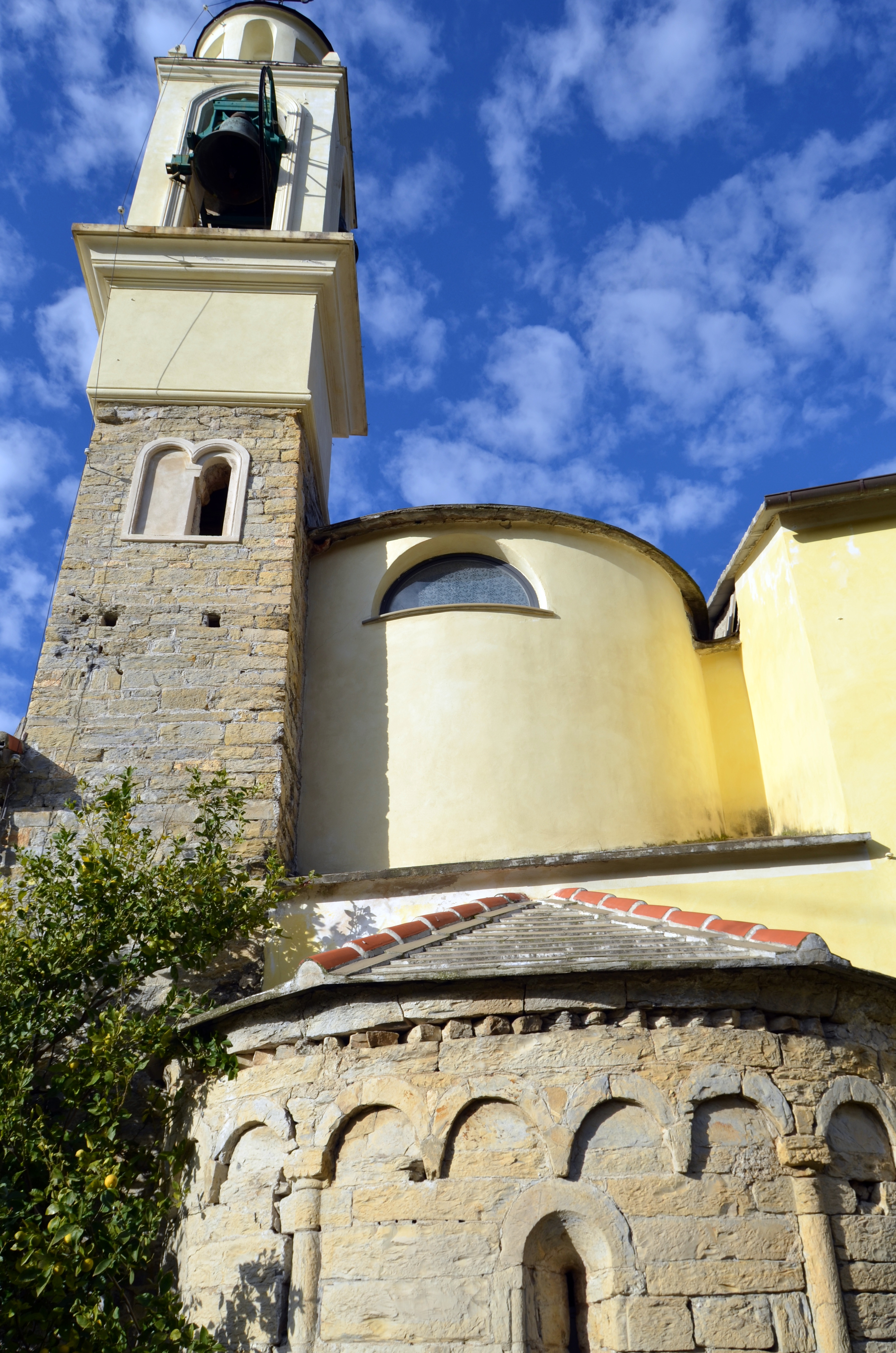 Chiesa di San Bartolomeo, San Bartolomeo, Sori, Liguria, Italia